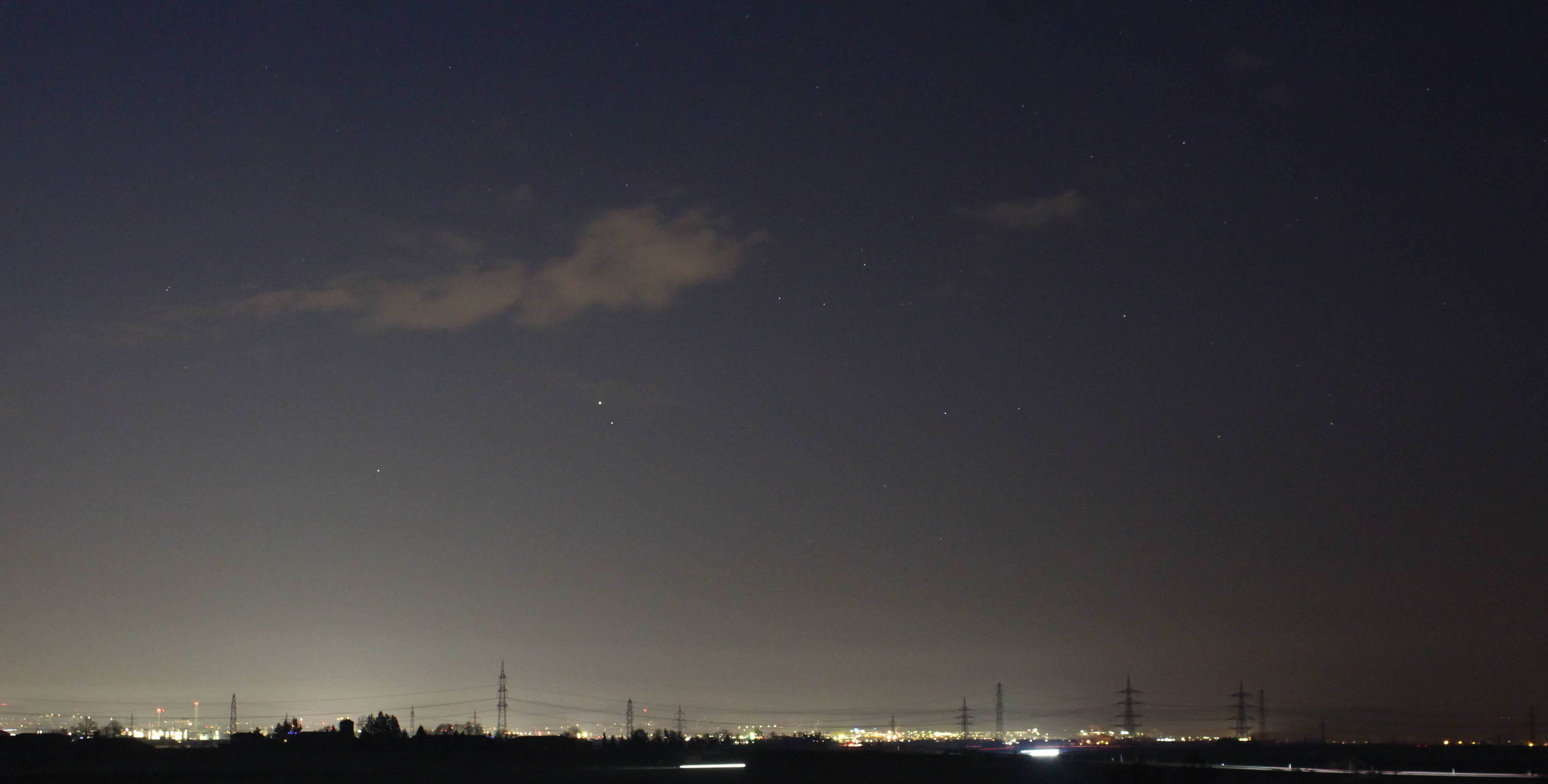 Konjunktion der Planeten Mars und Jupiter, sowie der weiter östlich gelegene Saturn am Morgenhimmel über Sindelfingen Aufnahmezeitpunkt: 20.3.2020 5:17:18 Uhr MEZ Sensorempfindlichkeit: ISO-1600 6 Belichtungszeit: 6 Sekunden